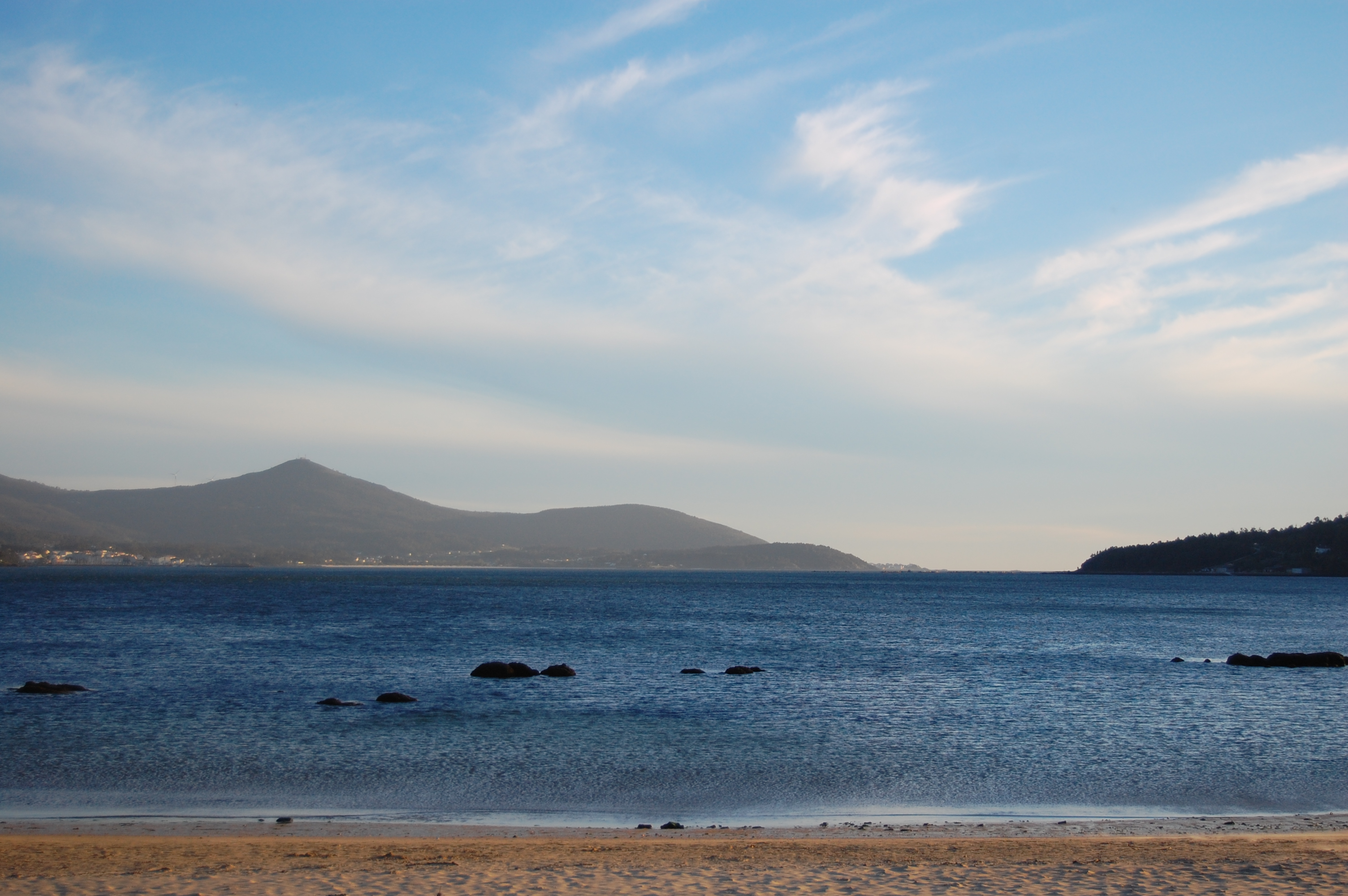 Praia de Broña no concello da Serra de Outes. Ó fondo pode verse a serra do Barbanza. Pertence ó Lugar de Importancia Comunitaria Esteiro do Tambre. This is a photography of a Special Area of Conservation in Spain with the ID: ES1110011. Natura2000 entry, EEA entry